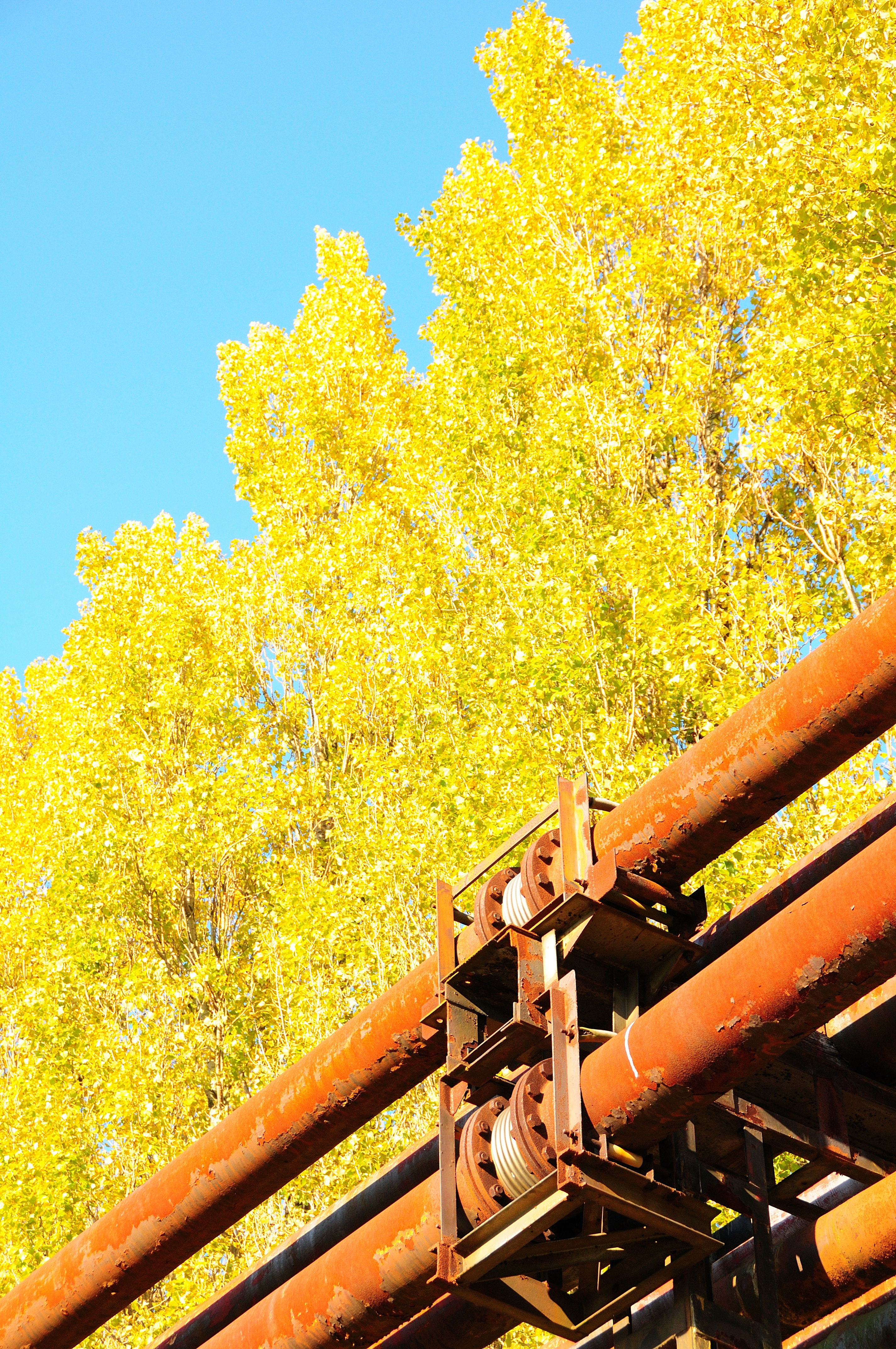 Indian Summer in Antwerp